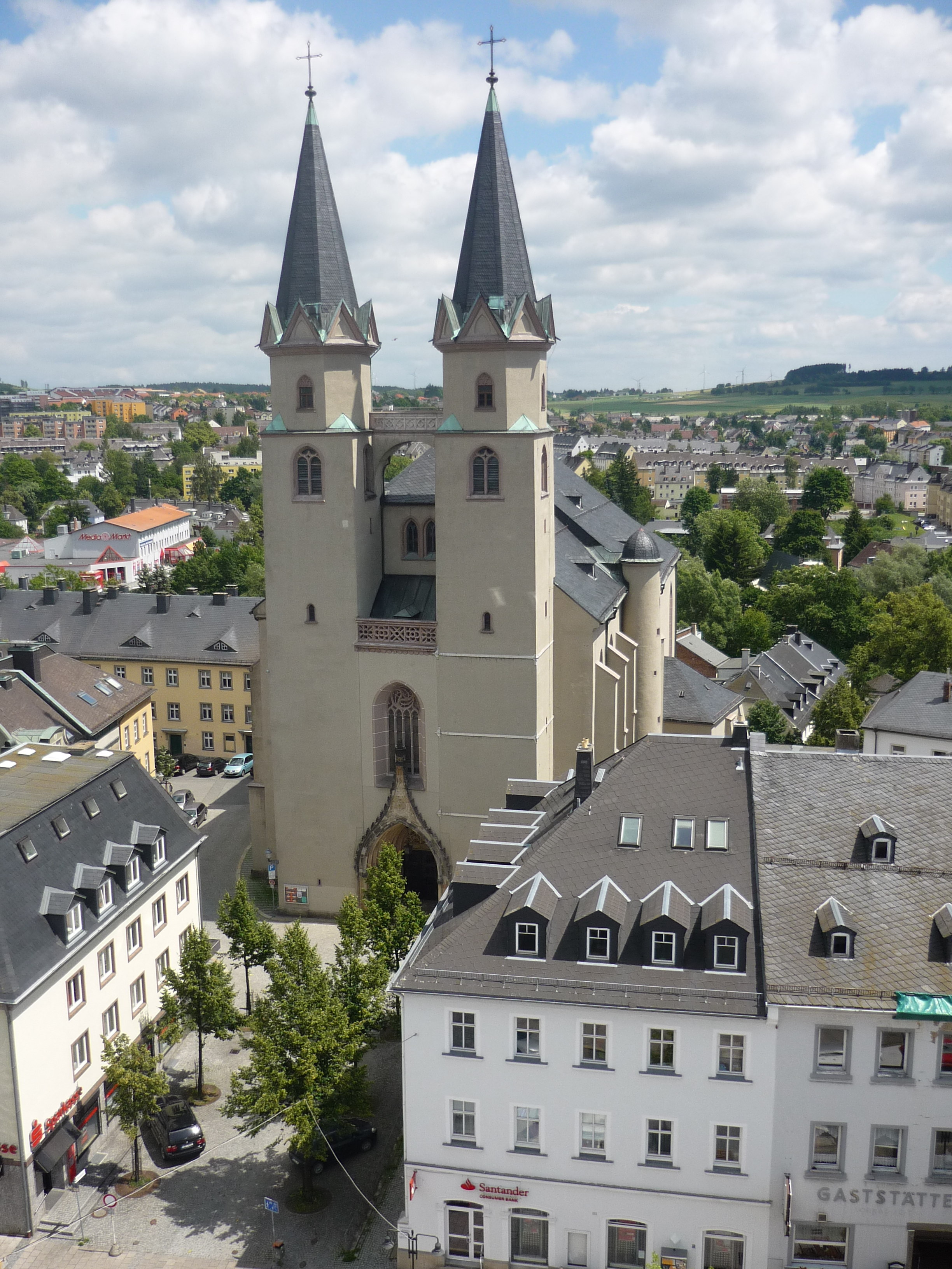 Evangelische Stadtkirche St. Michaelis in Hof